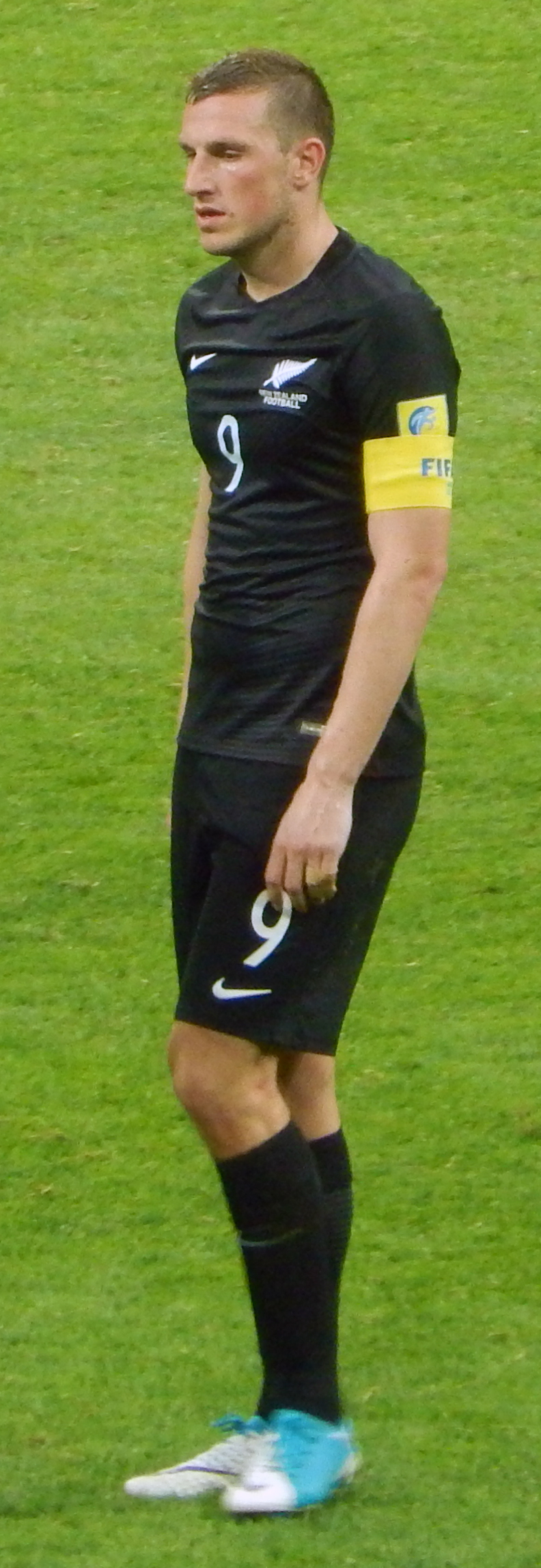 Крис Вуд в матче против сборной Мексики